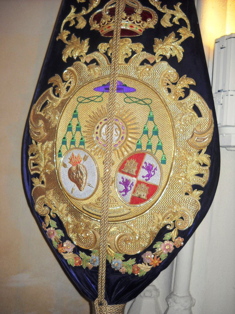 Escudo que aparece en el bacalao de la Hermandad